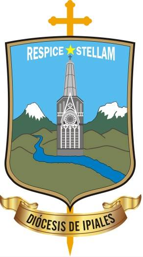 Diócesis de Ipiales